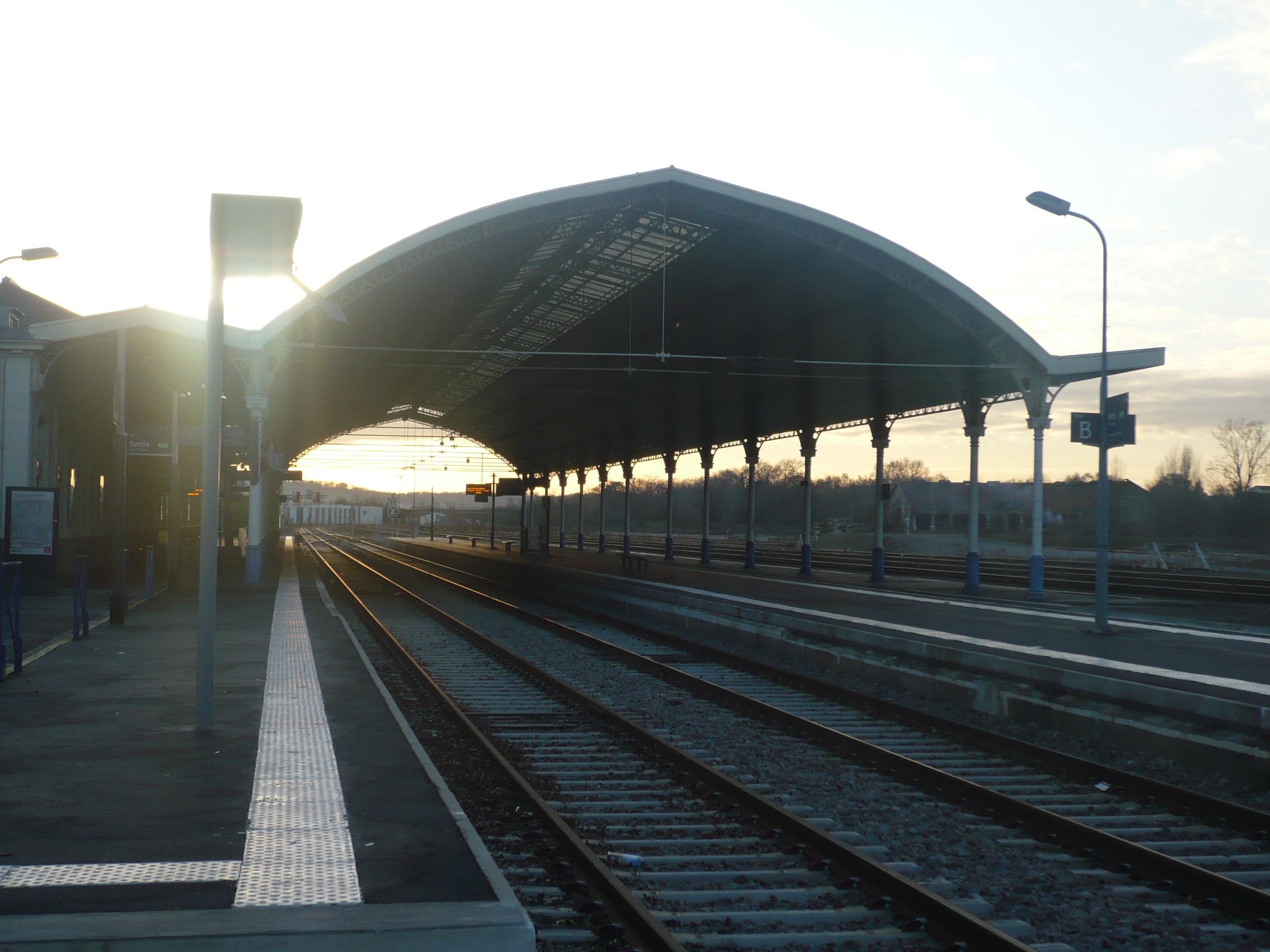 Castres